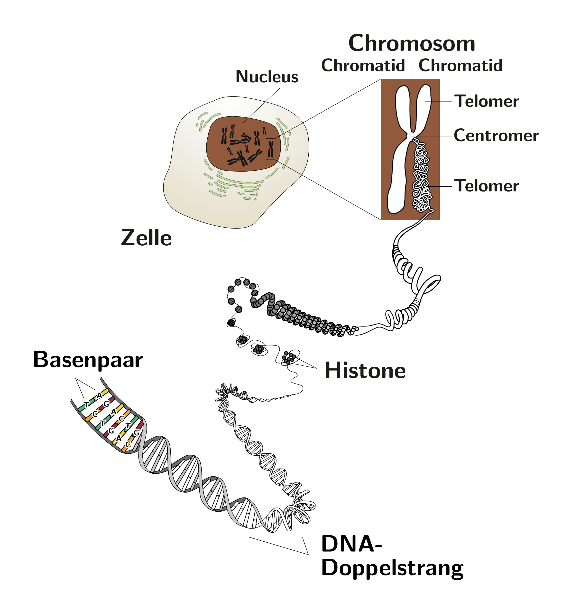 Chromosom und DNA